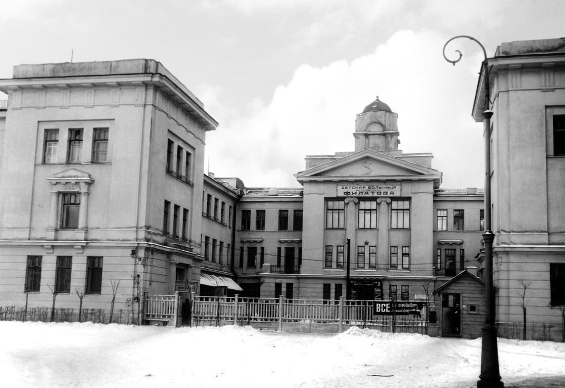 Детская больница им. Н. Ф. Филатова в Петрограде